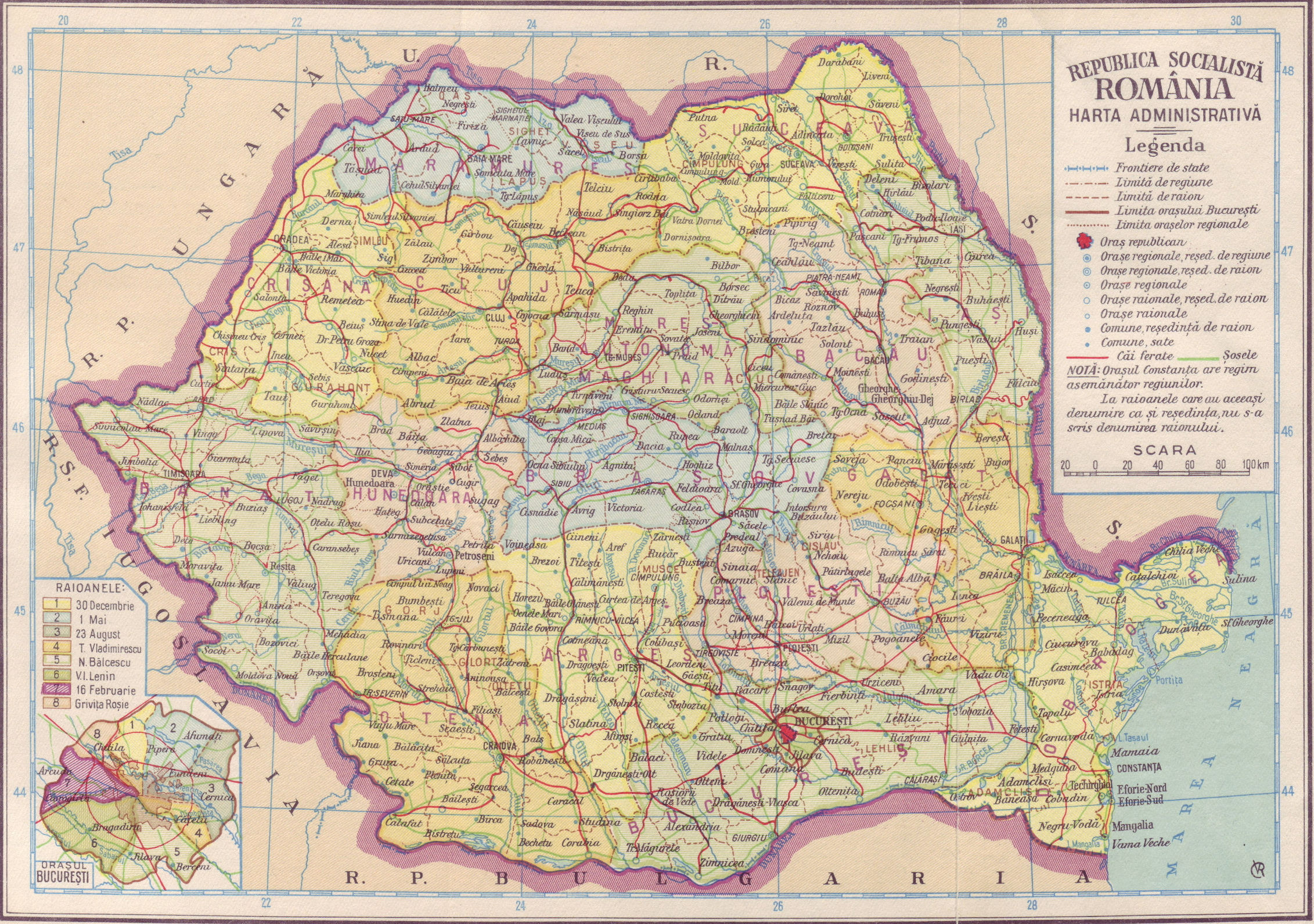 Împărțirea administrativ-teritorială a Republicii Socialiste România în anul 1966